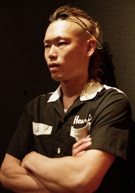 kenichikaki